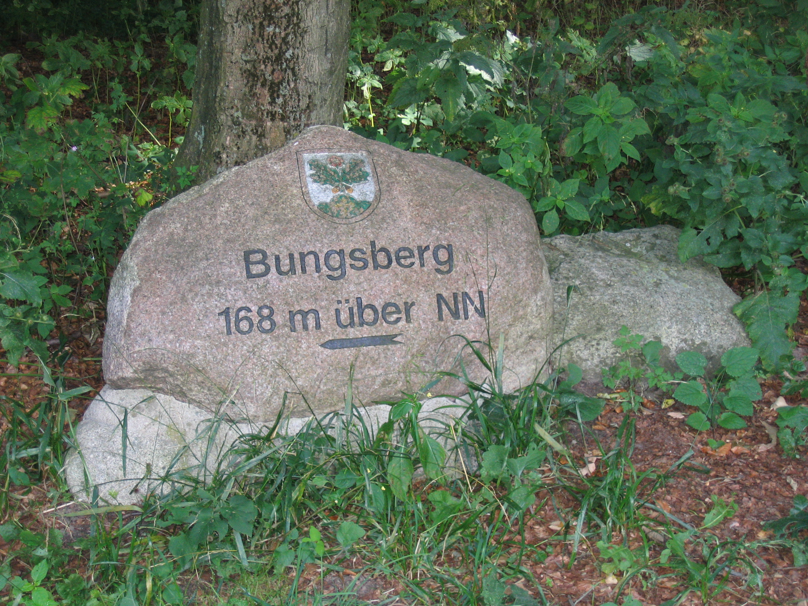 Bungsberg, Wegweiser Wayside marker in the Schleswig-Holstein Upland, Germany